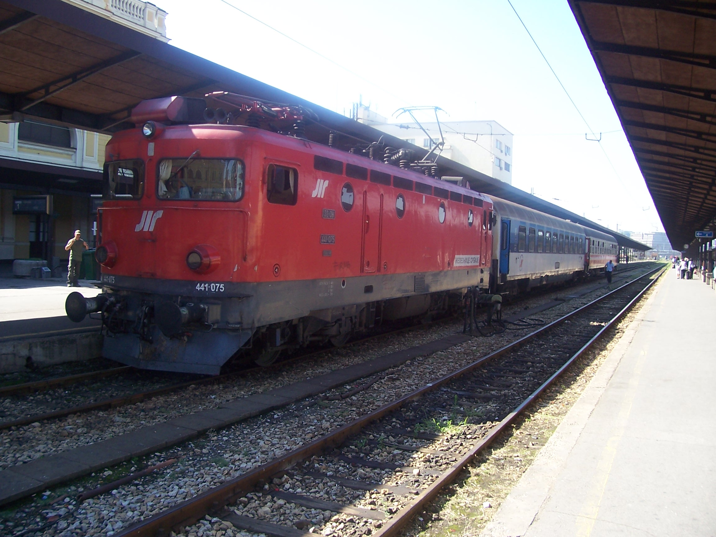 Белград, вокзал электровоз Железных дорог Сербии